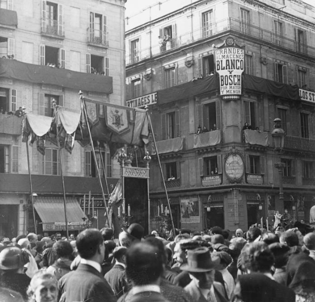 Altres aspecte de la processó de la Mercè. Josep Salvany i Blanch (1914)